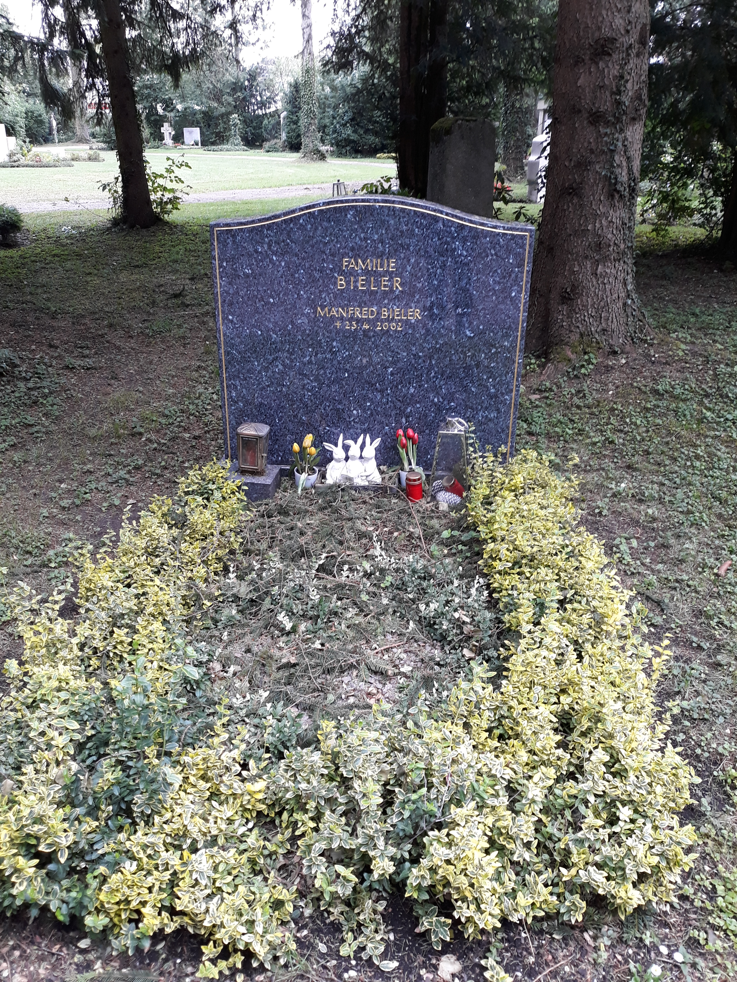 Das Grab des deutschen Schriftstellers Manfred Bieler auf dem Friedhof Obermenzing in München. Die Kaninchenfiguren erinnern an den DEFA-Film "Das Kaninchen bin ich", dessen Drehbuch Bieler verfasste.